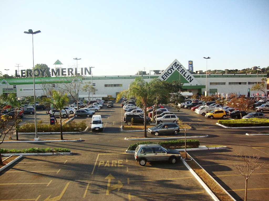 Leroy Merlin de Contagem (Minas Gerais, Brasil).